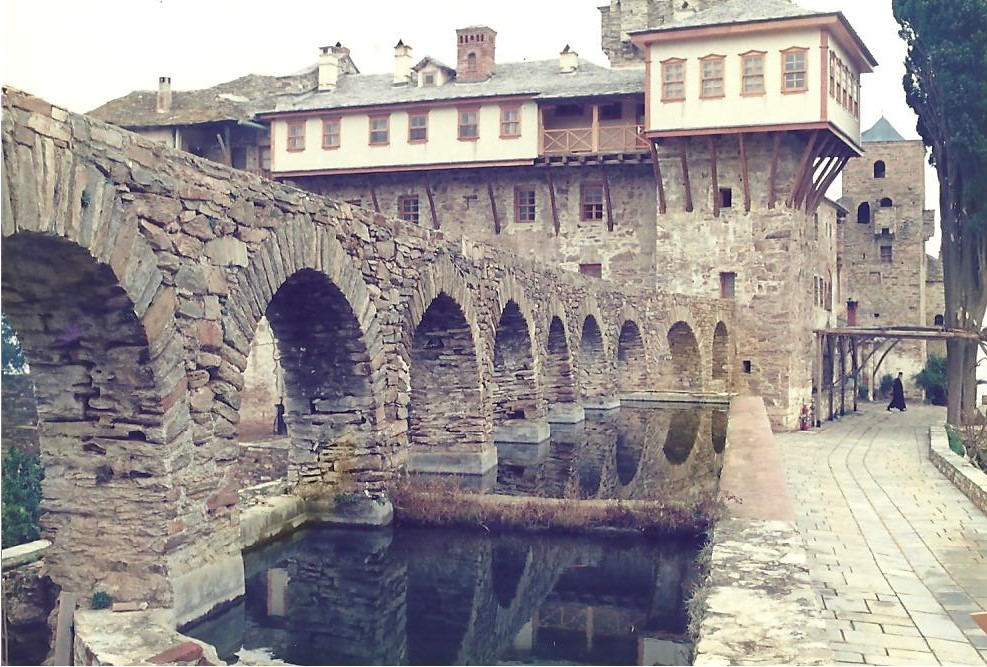 Μονή Σταυρονικήτα, το υδραγωγείο«Μονή Σταυρονικήτα»